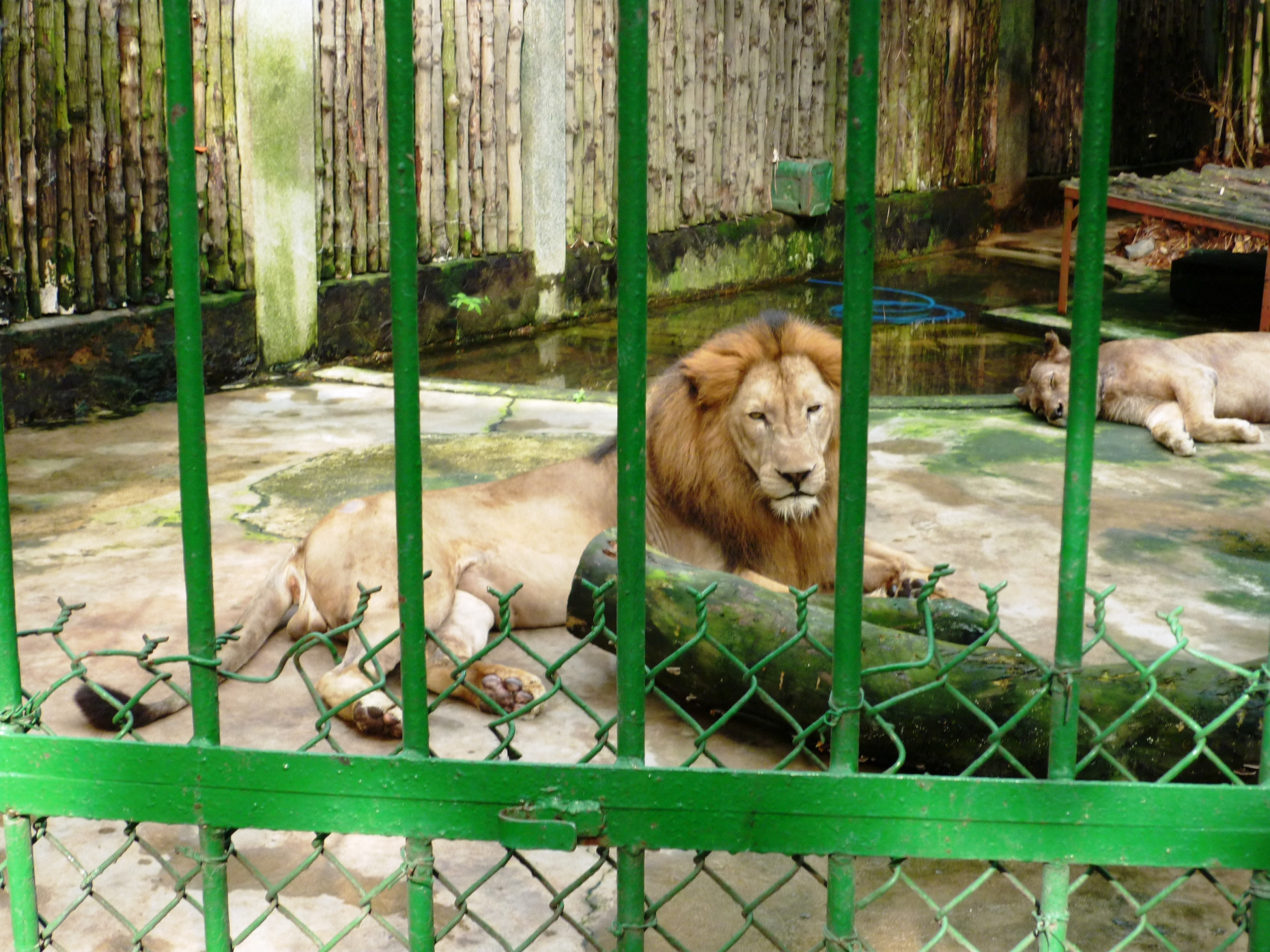 Hai con sư tử đang nghỉ ngơi chờ bữa ăn